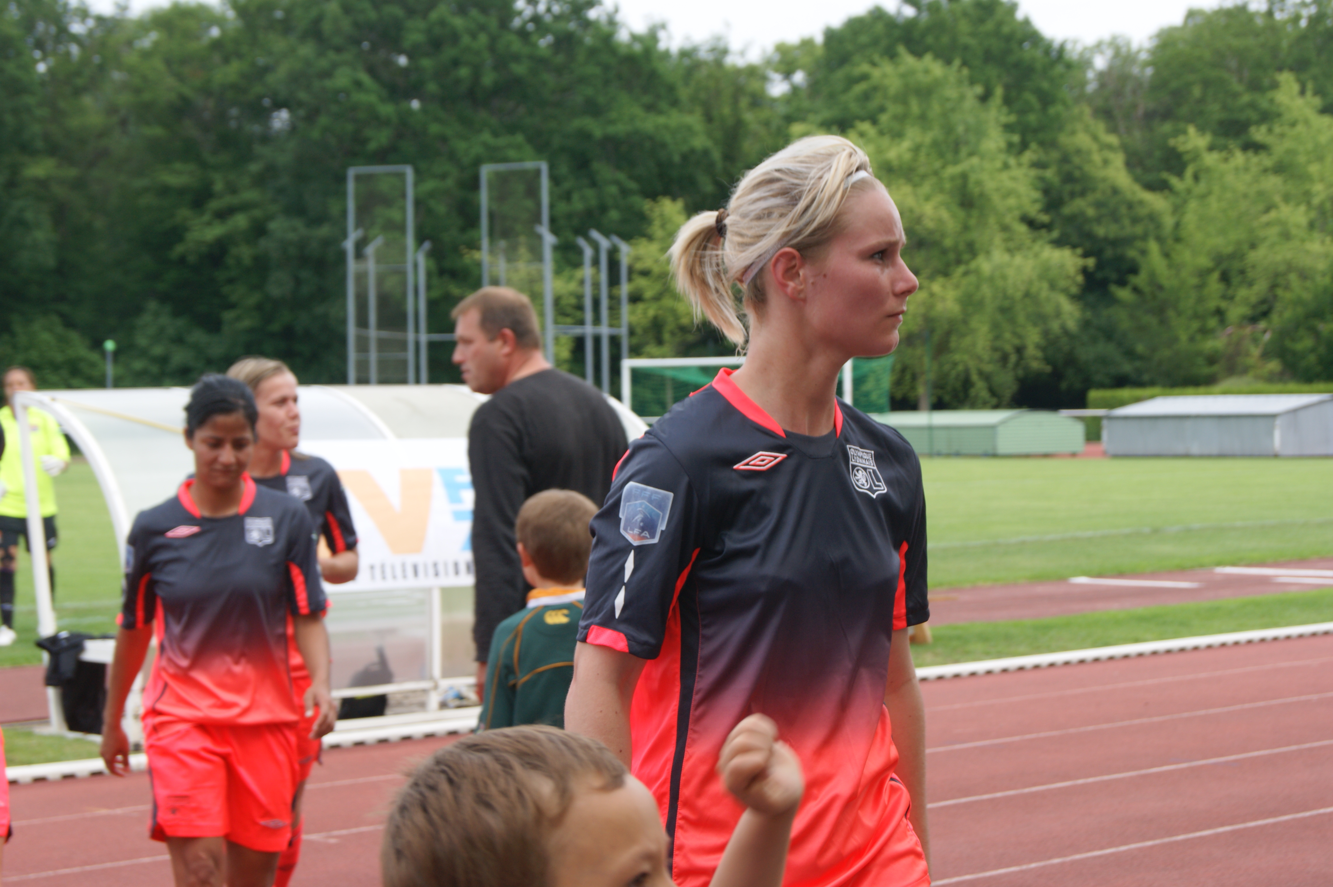 Amandine Henry lors du match AS Montigny-le-Bretonneux-Olympique lyonnais à l'occasion de la dernière journée du championnat de France de football féminin 2009-2010.